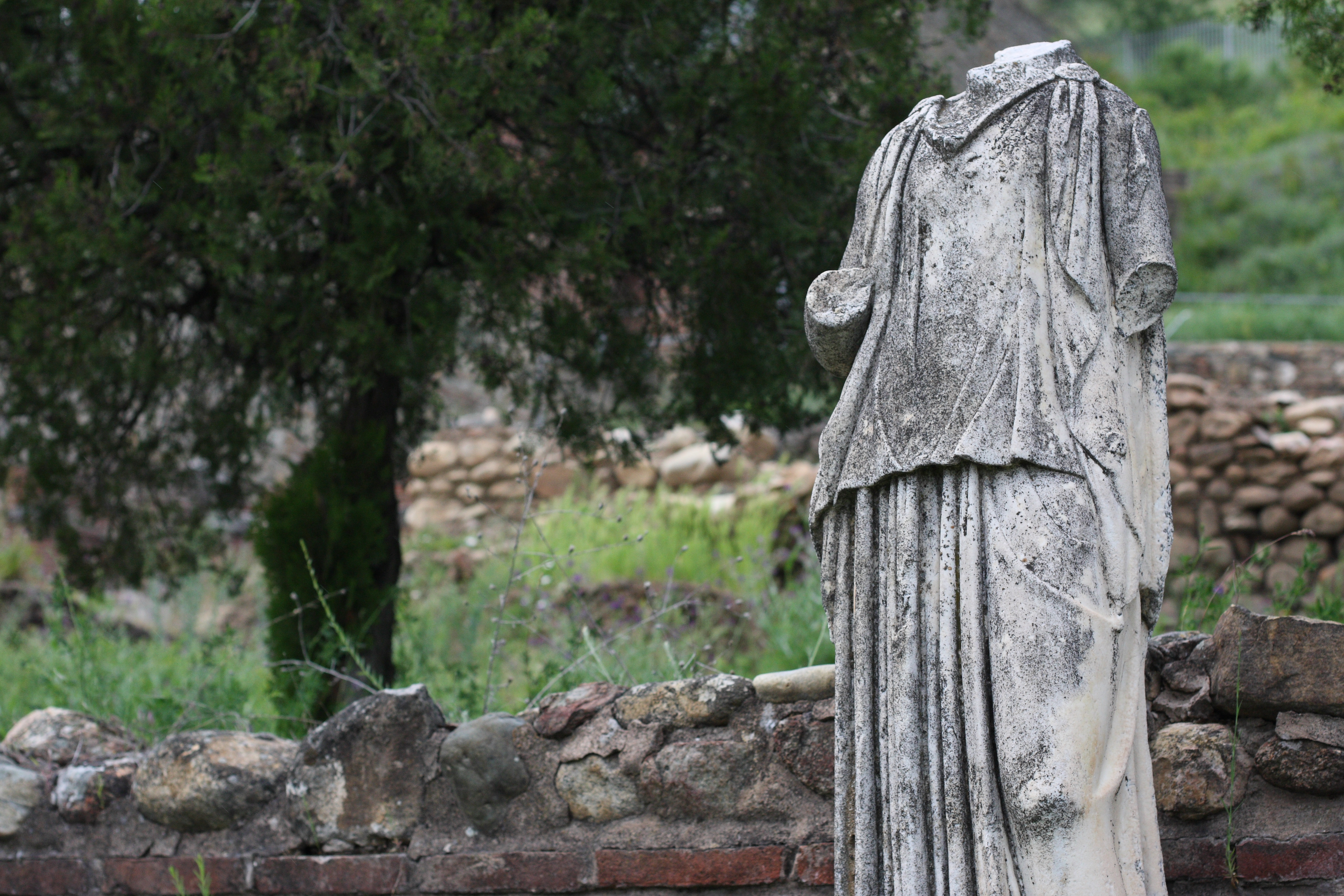 Helaclea in Bitola